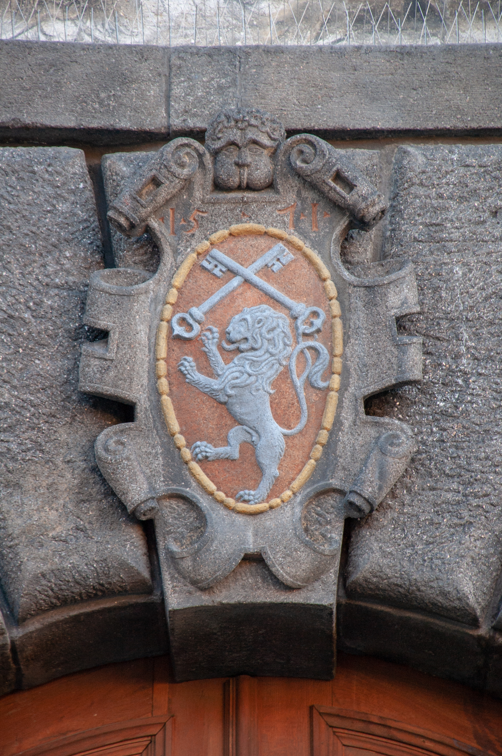 Budova staré radnice v Prachaticích – znak města